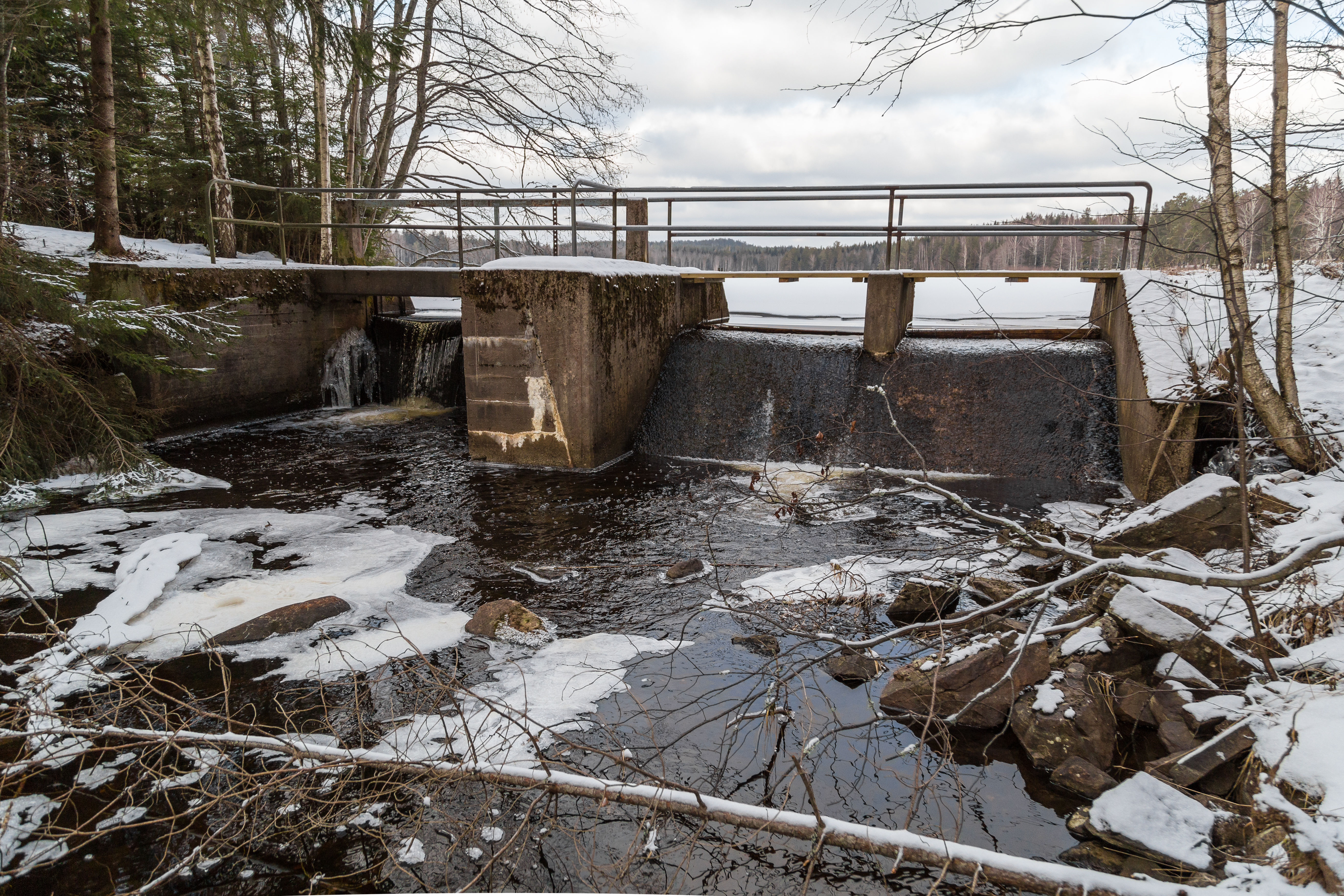 Lillsjöns utlopp i Bjurforsbäcken, Norbergs kommun, Sverige.